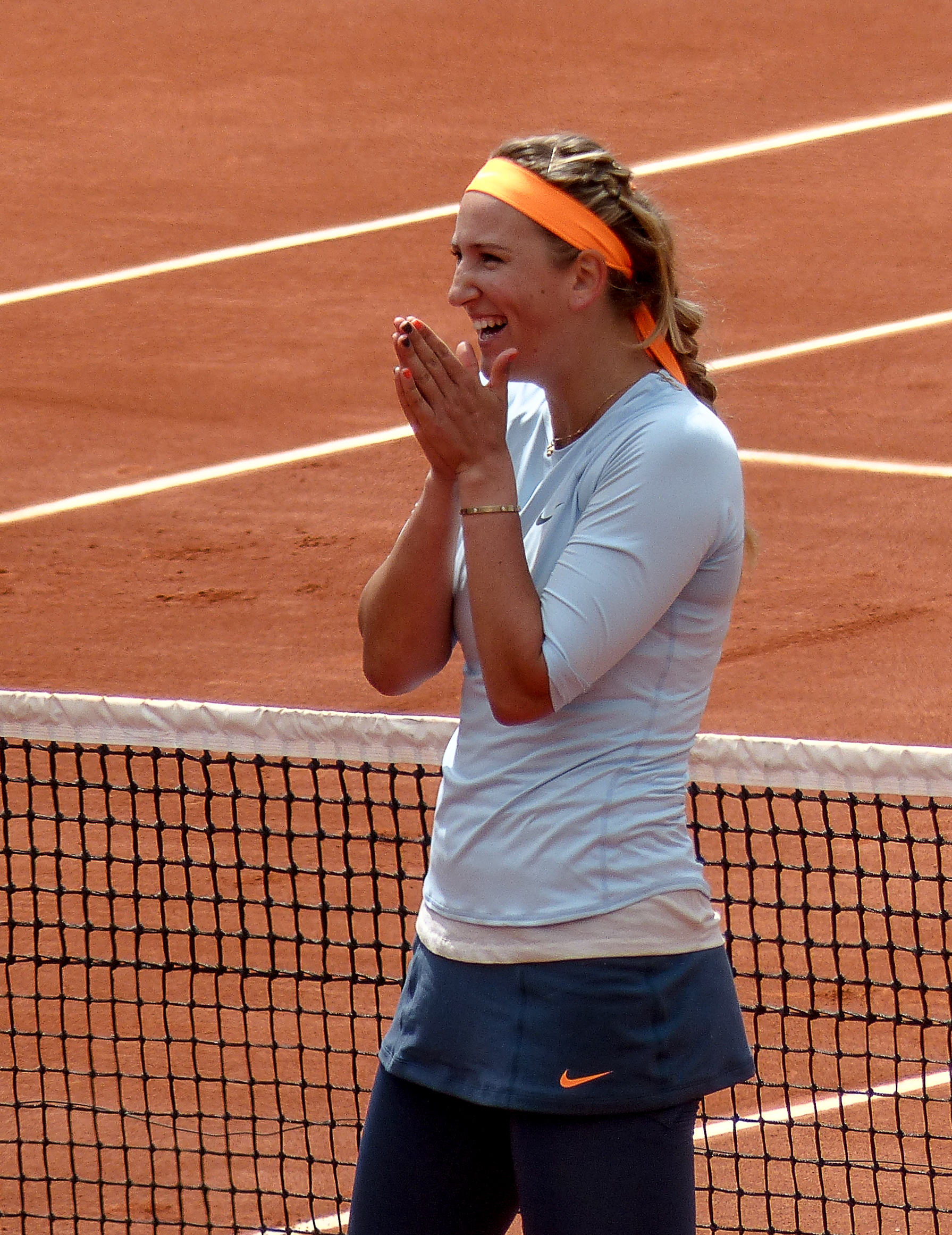 2ème tour Roland Garros 2013 : Victoria Azarenka (BLR) def. Elena Vesnina (RUS)